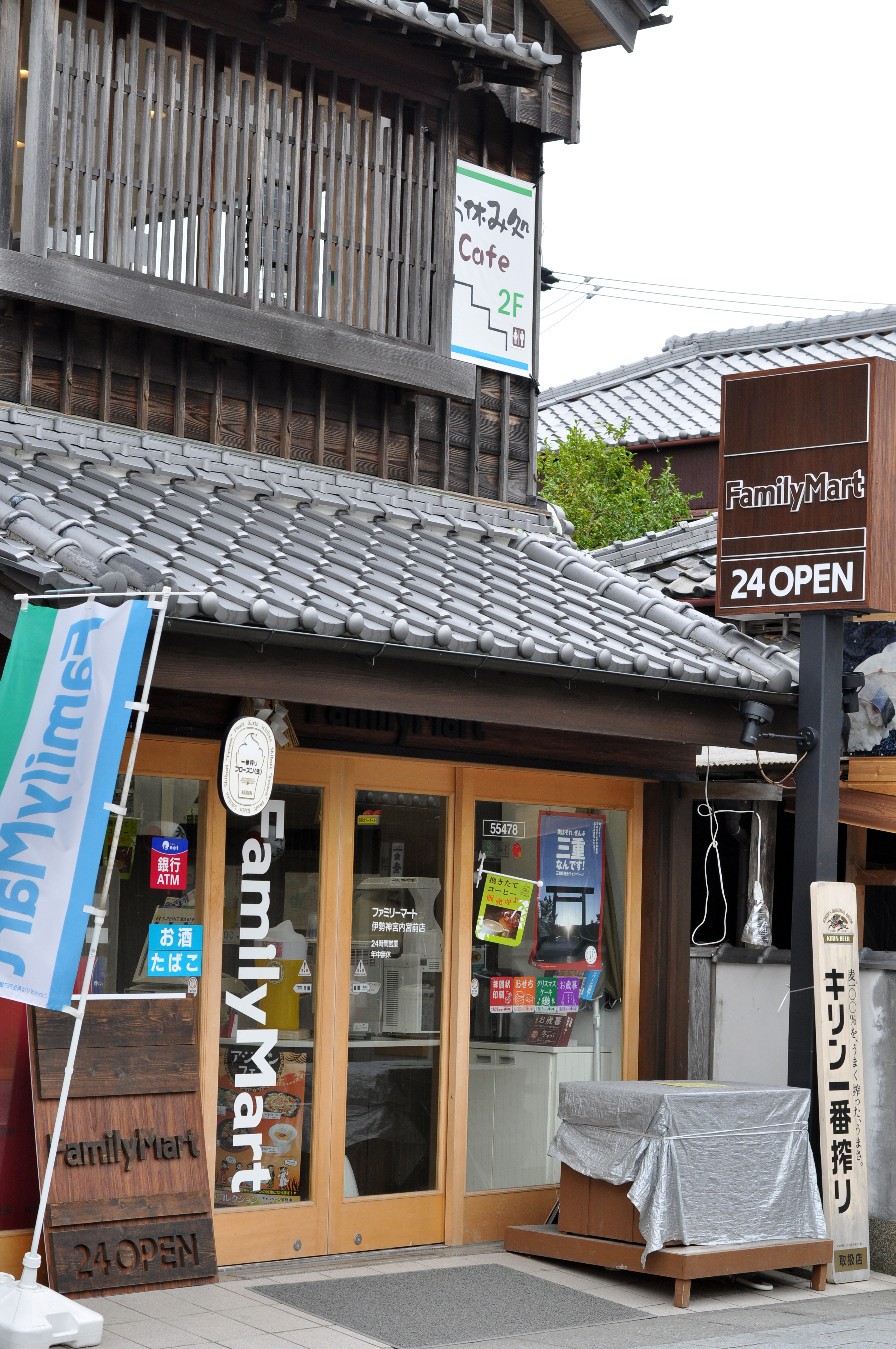 ファミリーマート伊勢神宮内宮前店